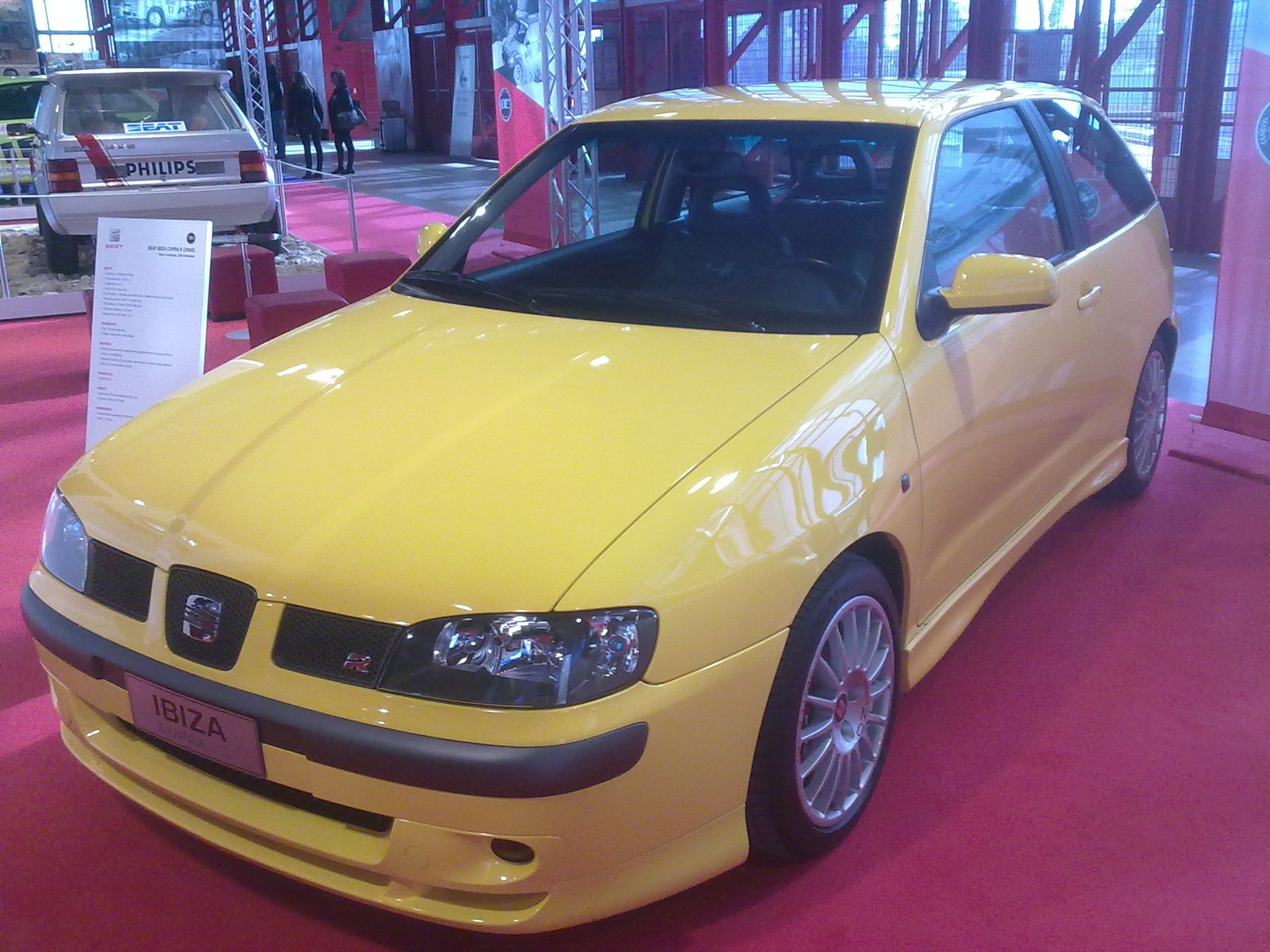 SEAT Ibiza Cupra R, Retro clásica Madrid 2014 , 30 aniversario del SEAT